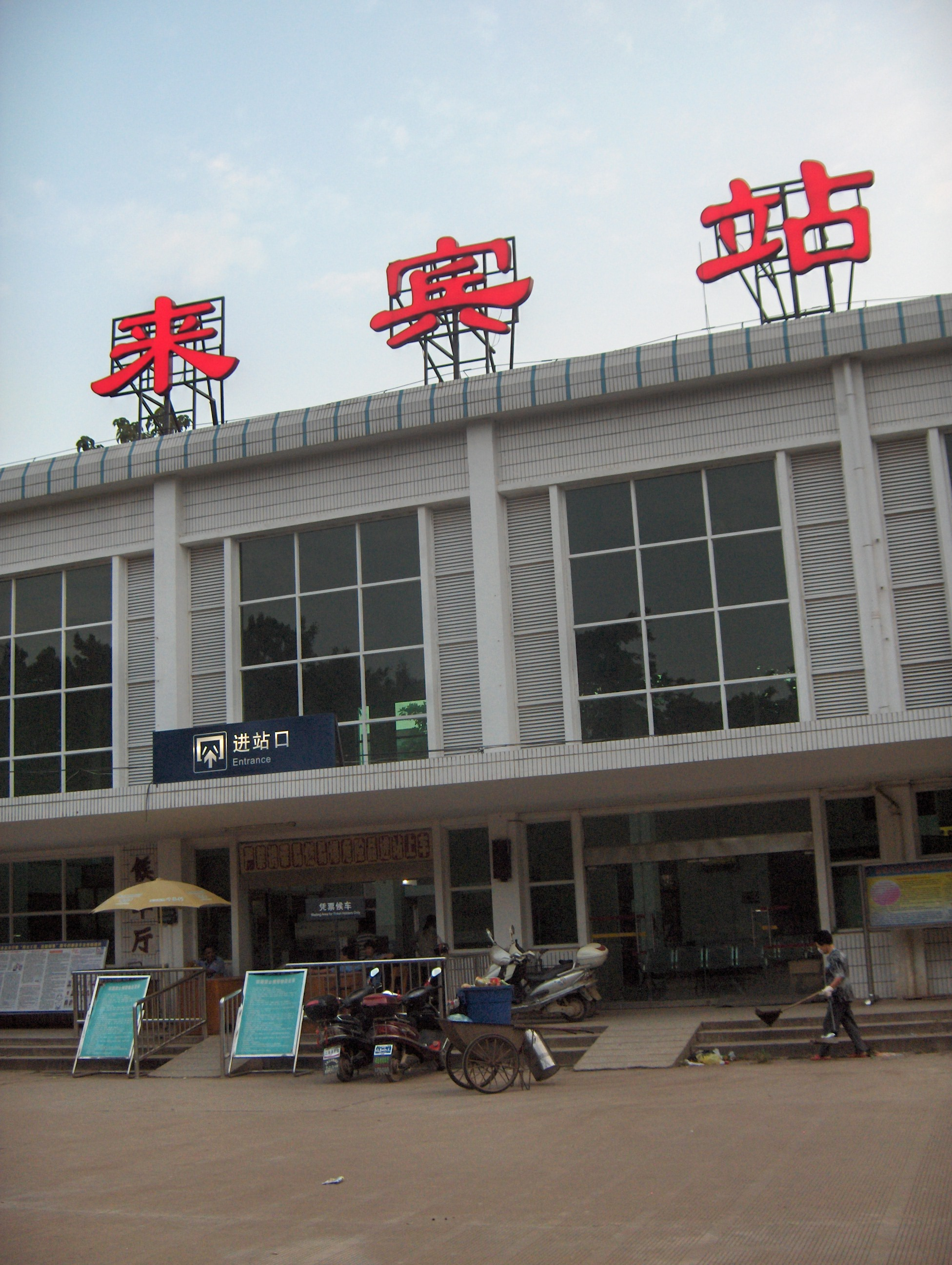 来宾火车站候车厅